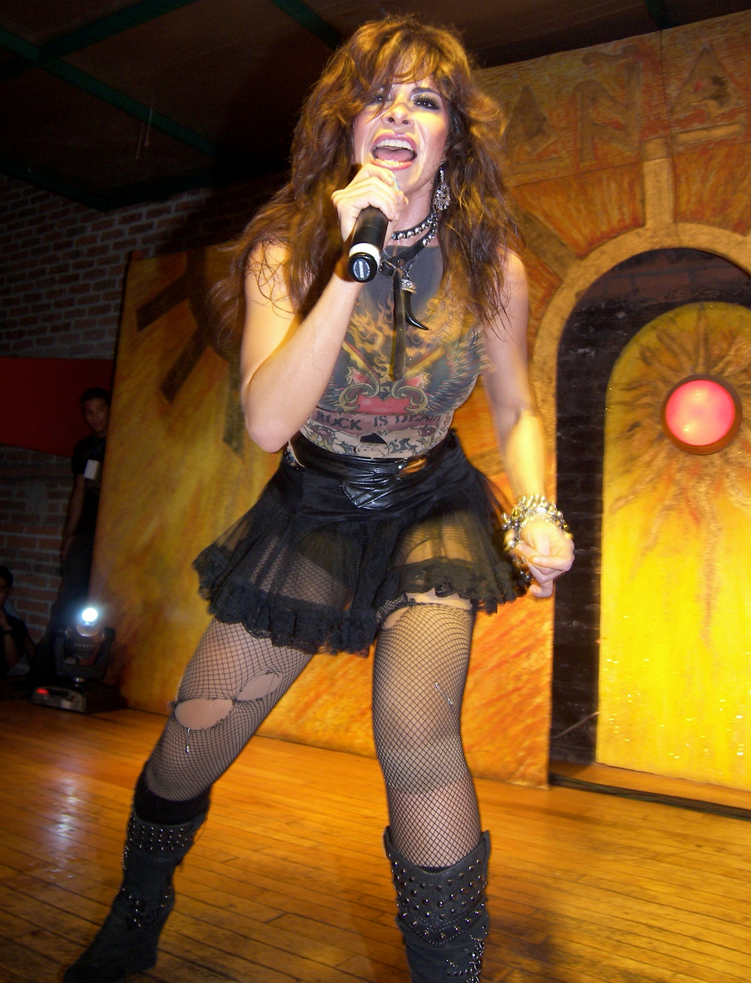 Gloria Trevi durante su presentación en el Club Mañana, en Puerto Vallarta, 2007.